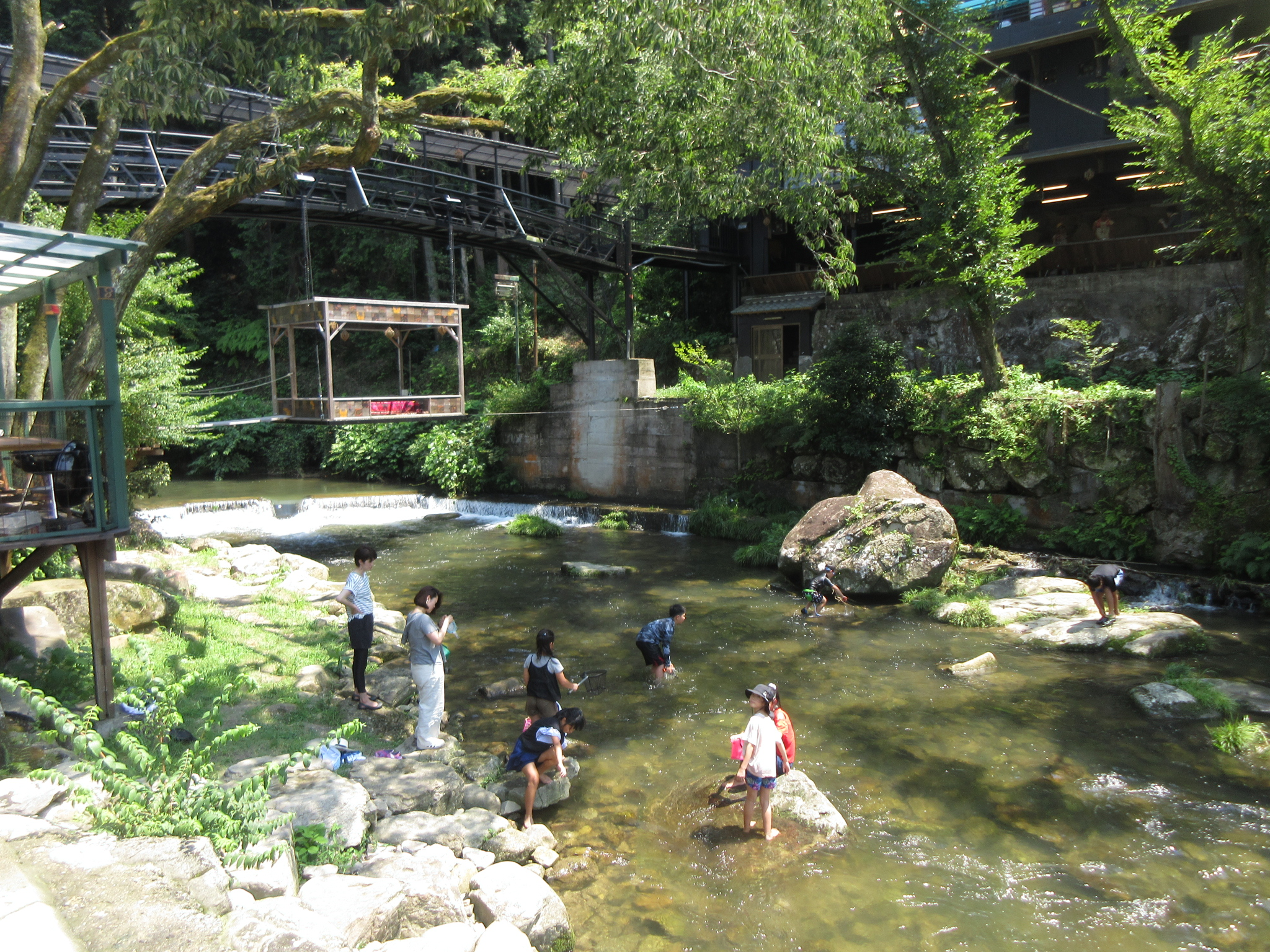 ウッドデザインパーク（岡崎市鍛埜町）